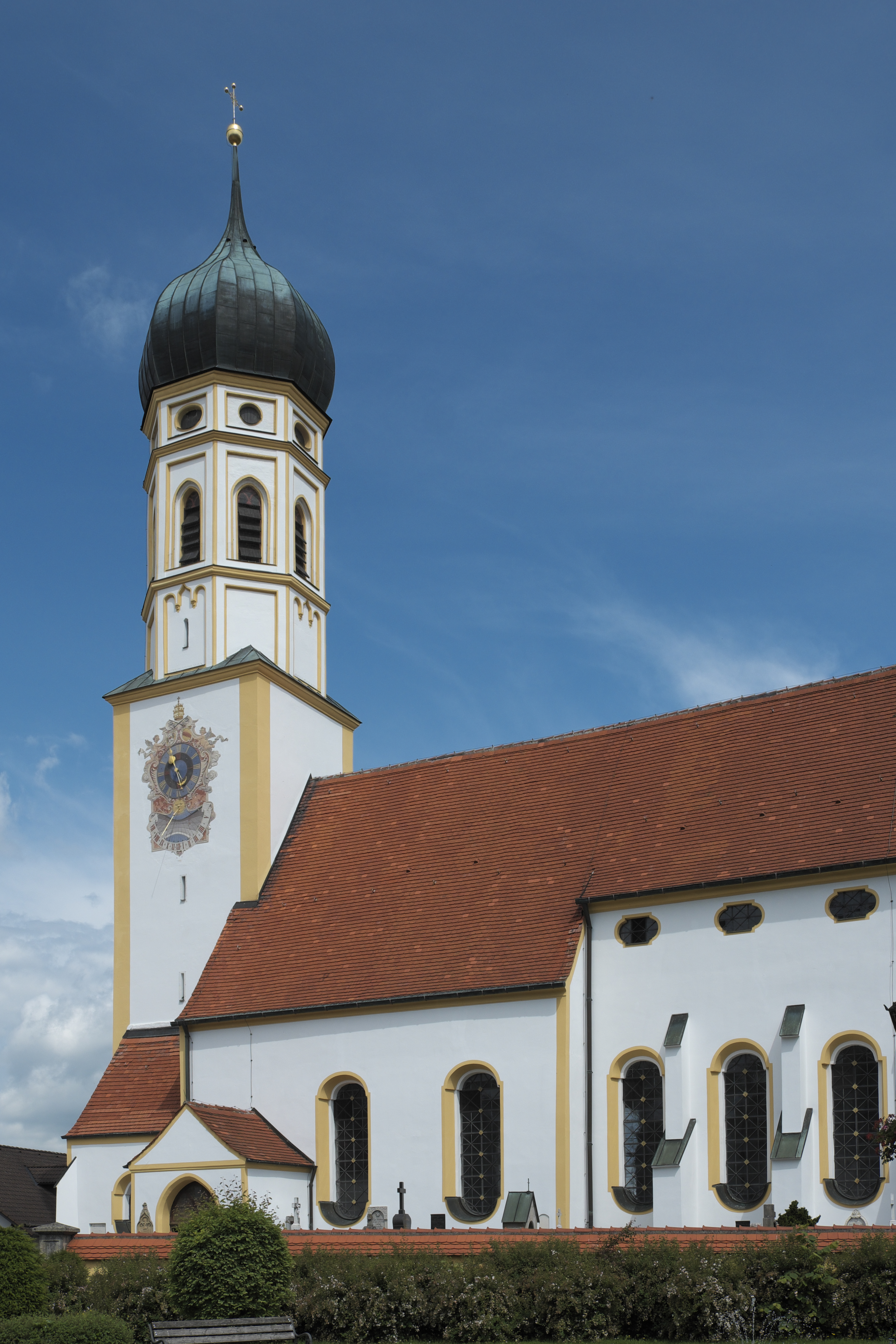 Katholische Pfarrkirche St. Peter und Paul in Oberalting, einem Ortsteil von Seefeld (Bayern/Deutschland)